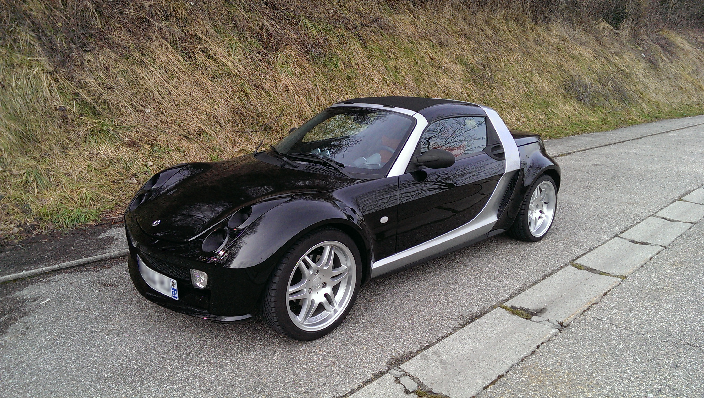 Smart roadster Brabus noir